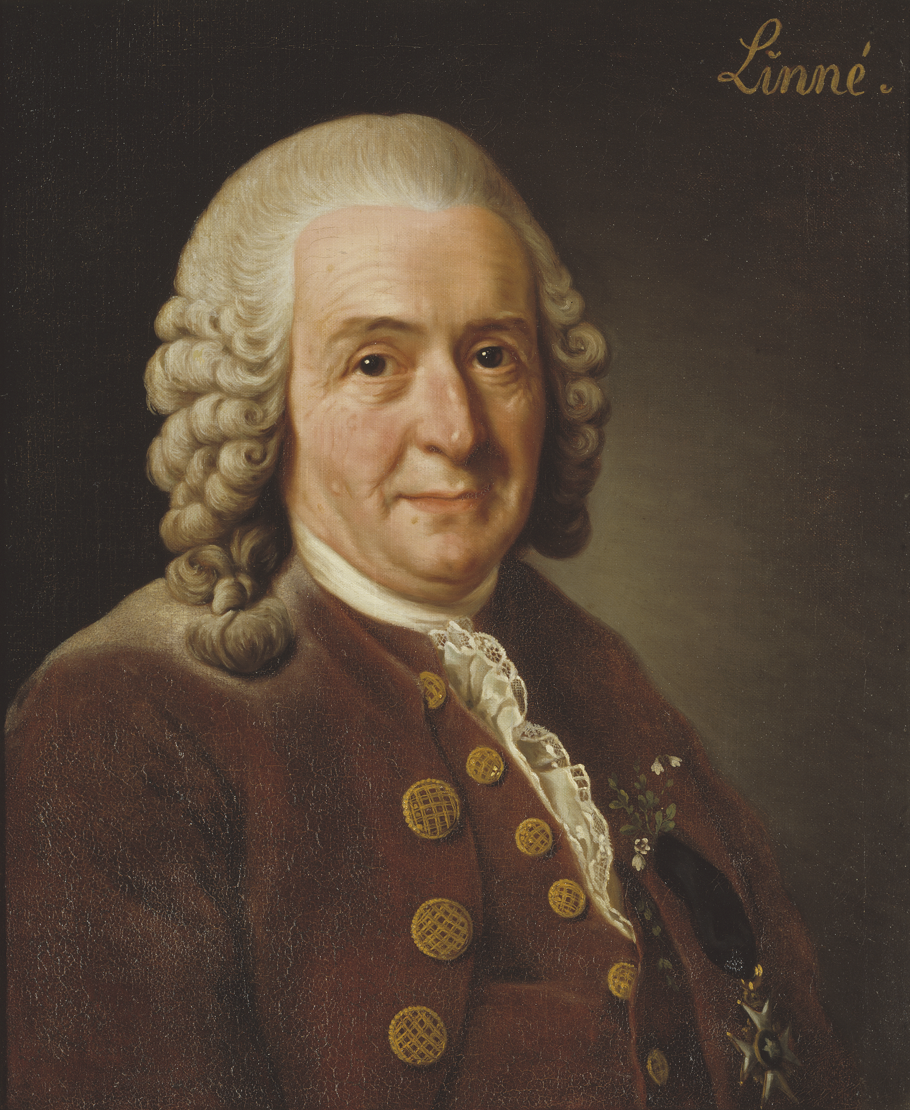 Replik